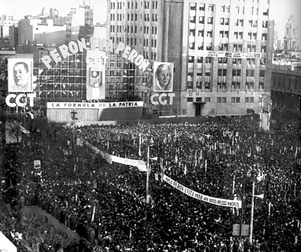 Acto por la candidatura Perón-Perón, frente al Ministerio de Obras Públicas en la Avenida 9 de Julio